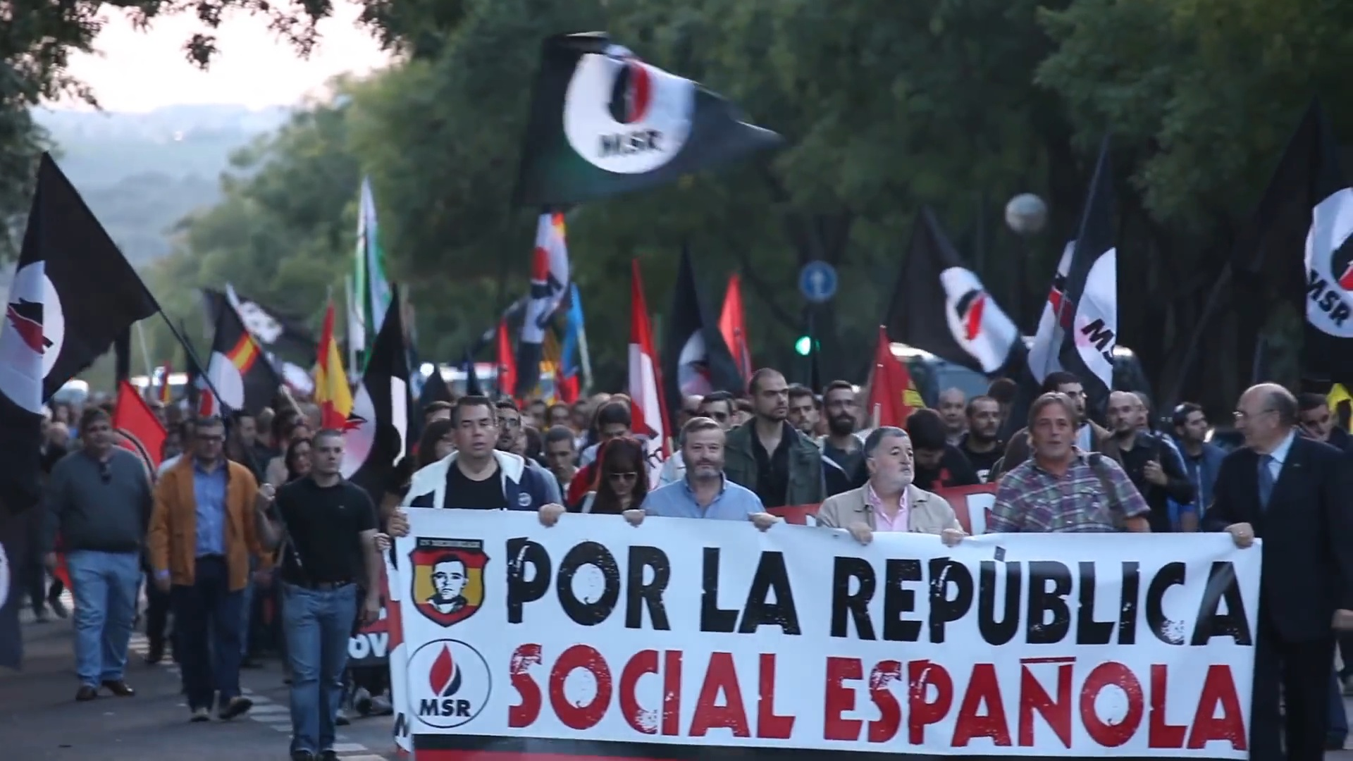 Manifestacion del MSR el 12 Octubre en Madrid, por la Republica Social y Nacional española.